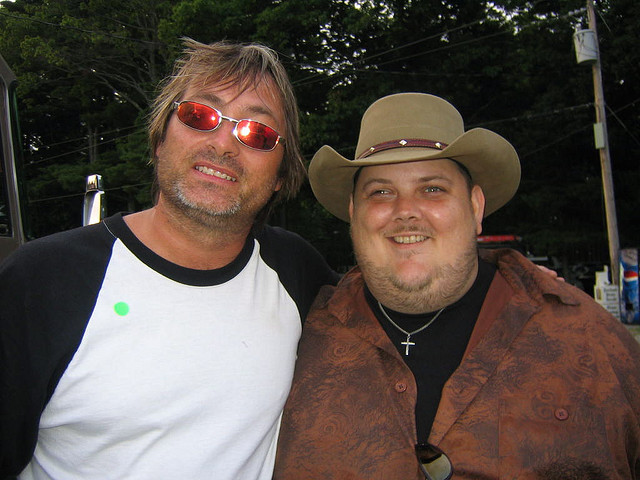 Sean Kelly und Johnny Hiland in Salt Water, 31. Juli 2005